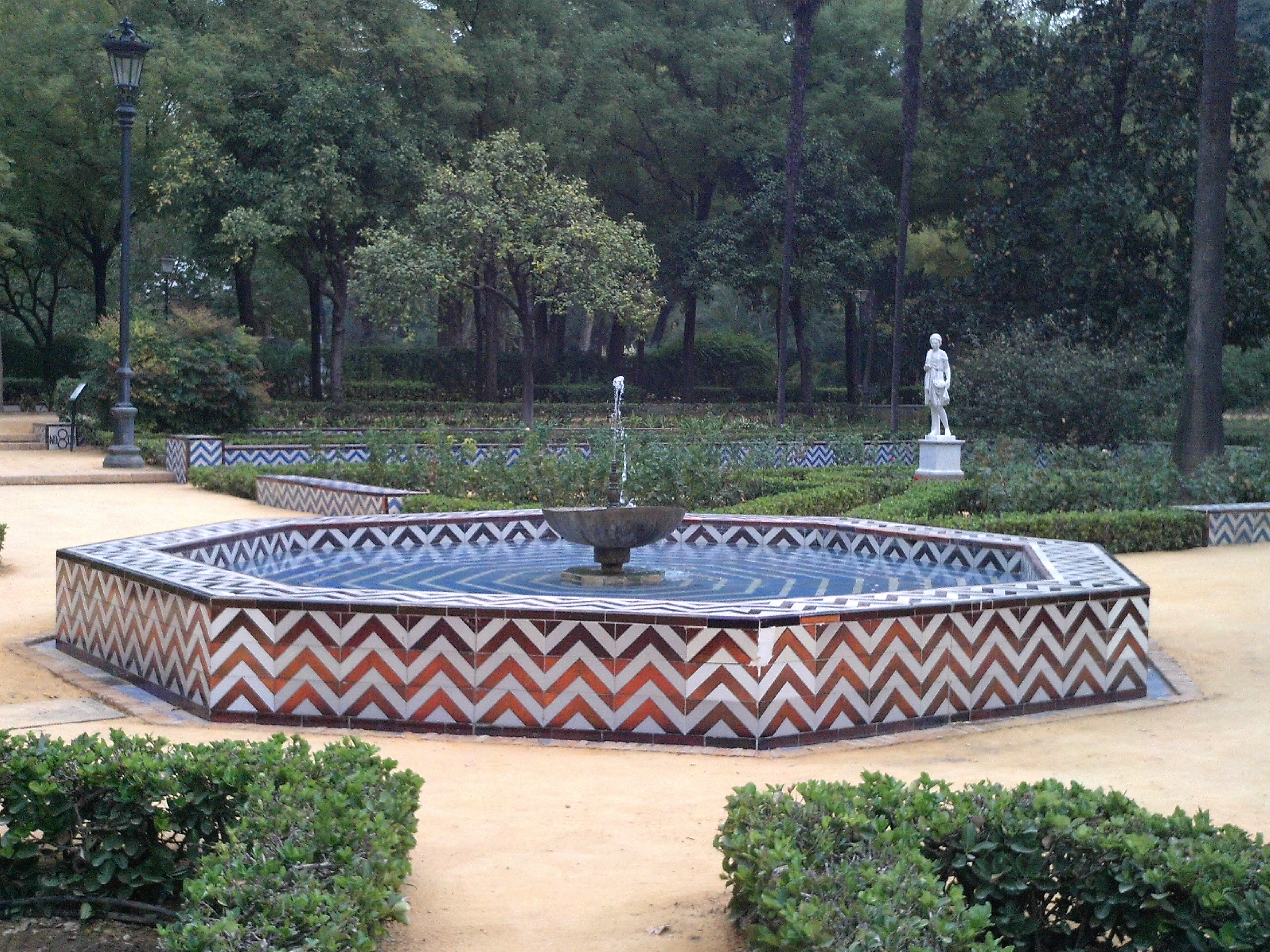 Fuente de la glorieta de la Concha. Parque de María Luisa, Sevilla, Andalucía, España.